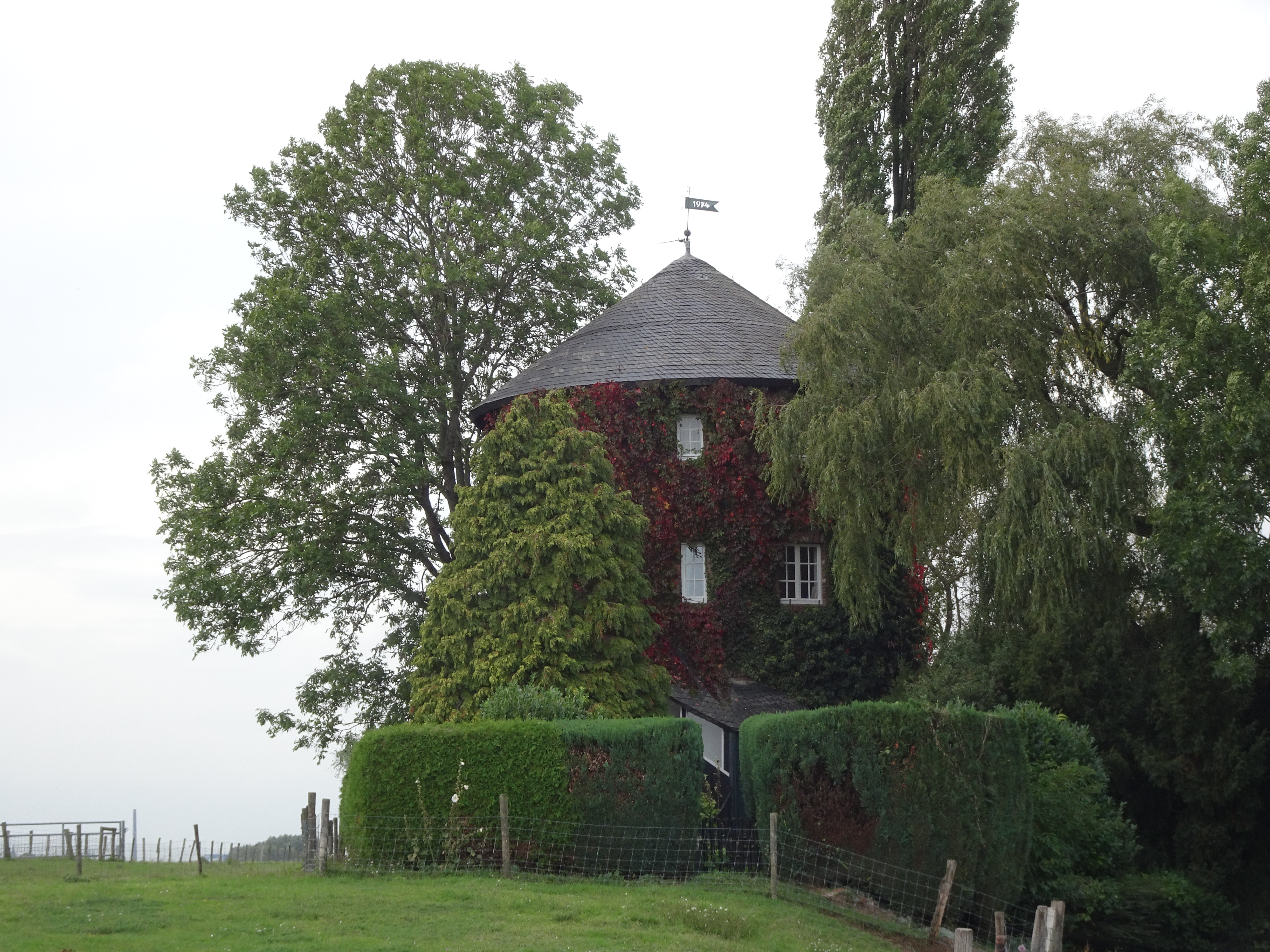 Emmerich am Rhein-Dornick, Dornicker Mühle This is a photograph of an architectural monument.